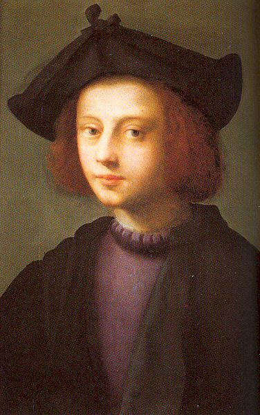 Pietro Carnesecchi, italienischer Humanist